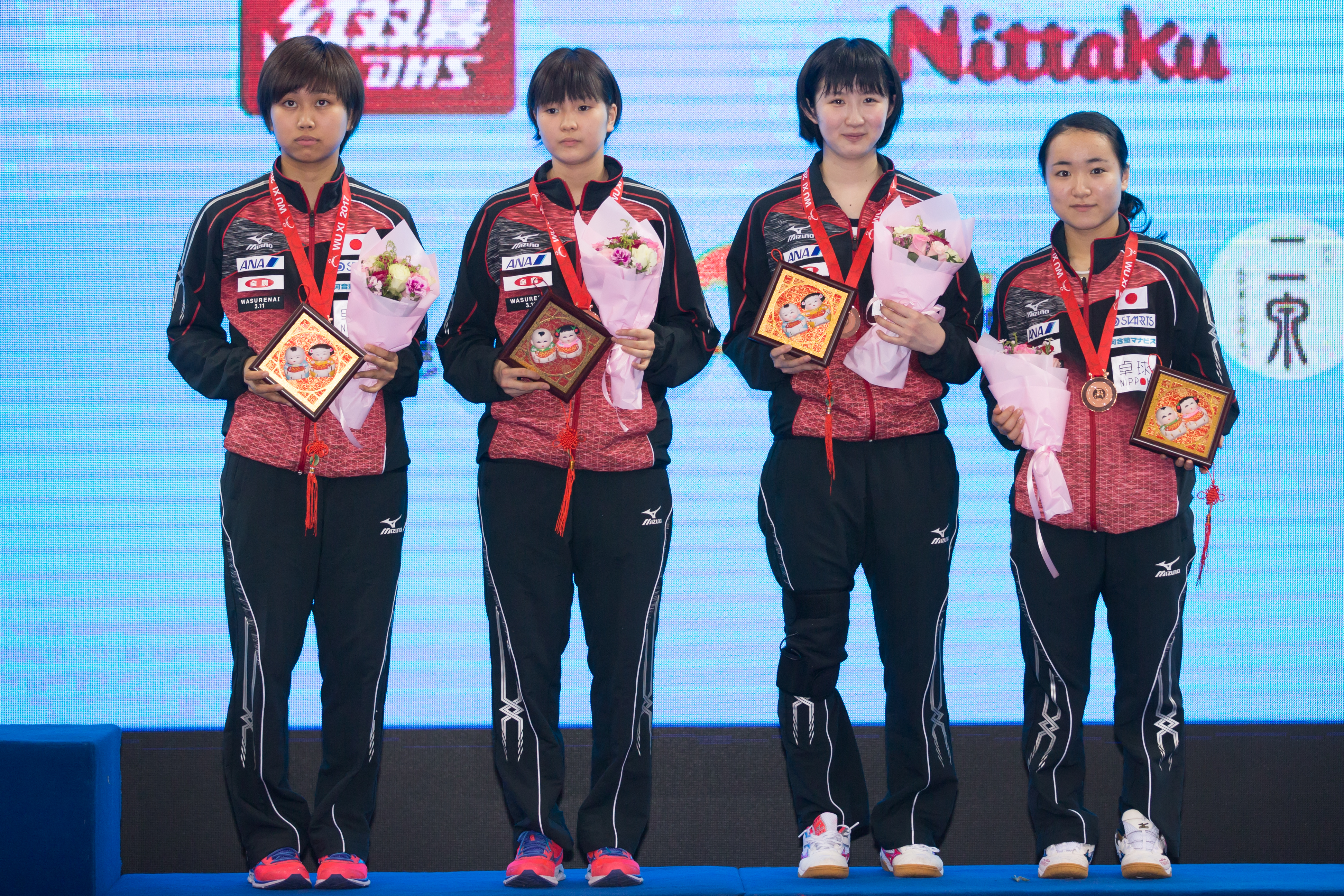 _K0K2634